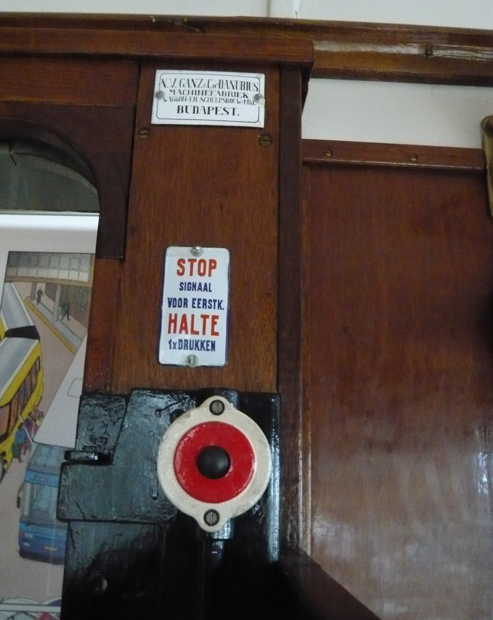 NZH Vervoer Museum, Leidsevaart 396, Haarlem Deur knop